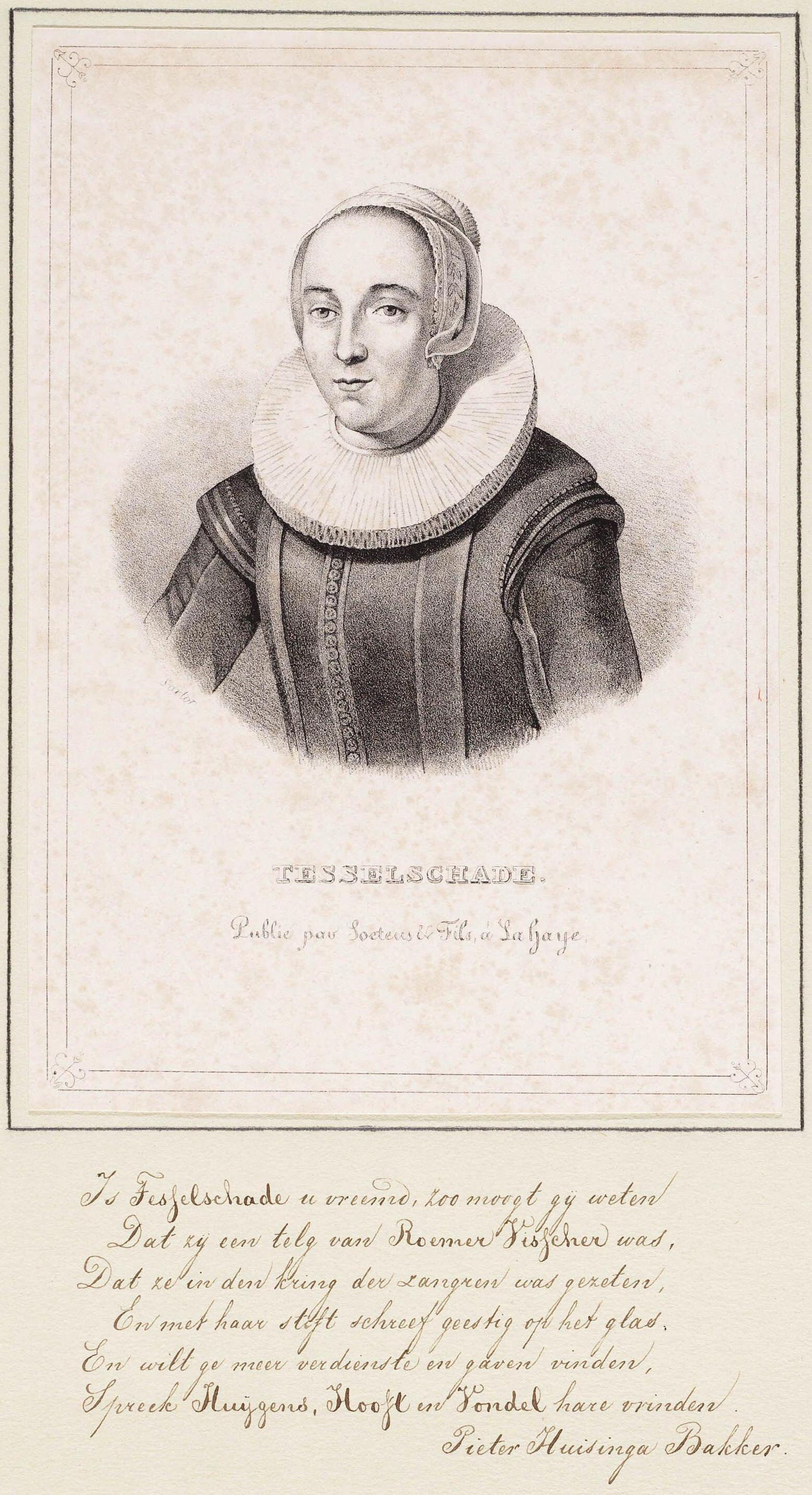 (postuum) borststuk naar links van Maria Tesselschade Roemers Visscher. Onderschrift van Pieter Huisinga Bakker (1731-1801): "Is Tesselschade u vreemd, zo moogt gij weten. Dat zij een telg van Roemer Visscher was. Dat ze in den kring der zangren was gezeten. En met haar stift schreef geestig op het glas. En wilt ge meer verdienste en gaven vinden. Spreek Huijgens, Hooft en Vondel hare vrinden." Dit vers komt voor in J. van Vloten (1852), Tesselschade Roemers en hare vrienden